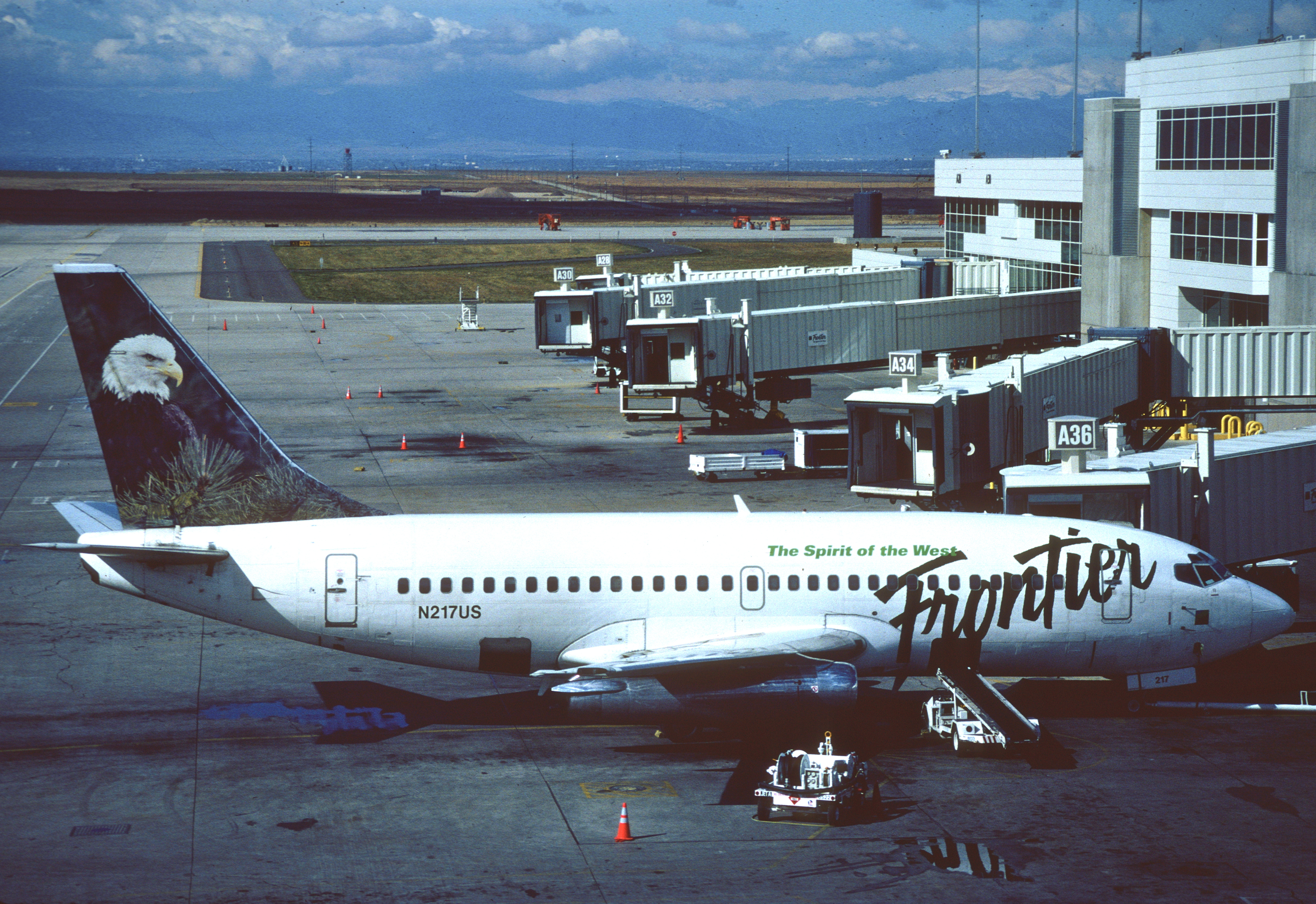 Frontier Airlines Boeing 737-201; N217US@DEN, October 1996